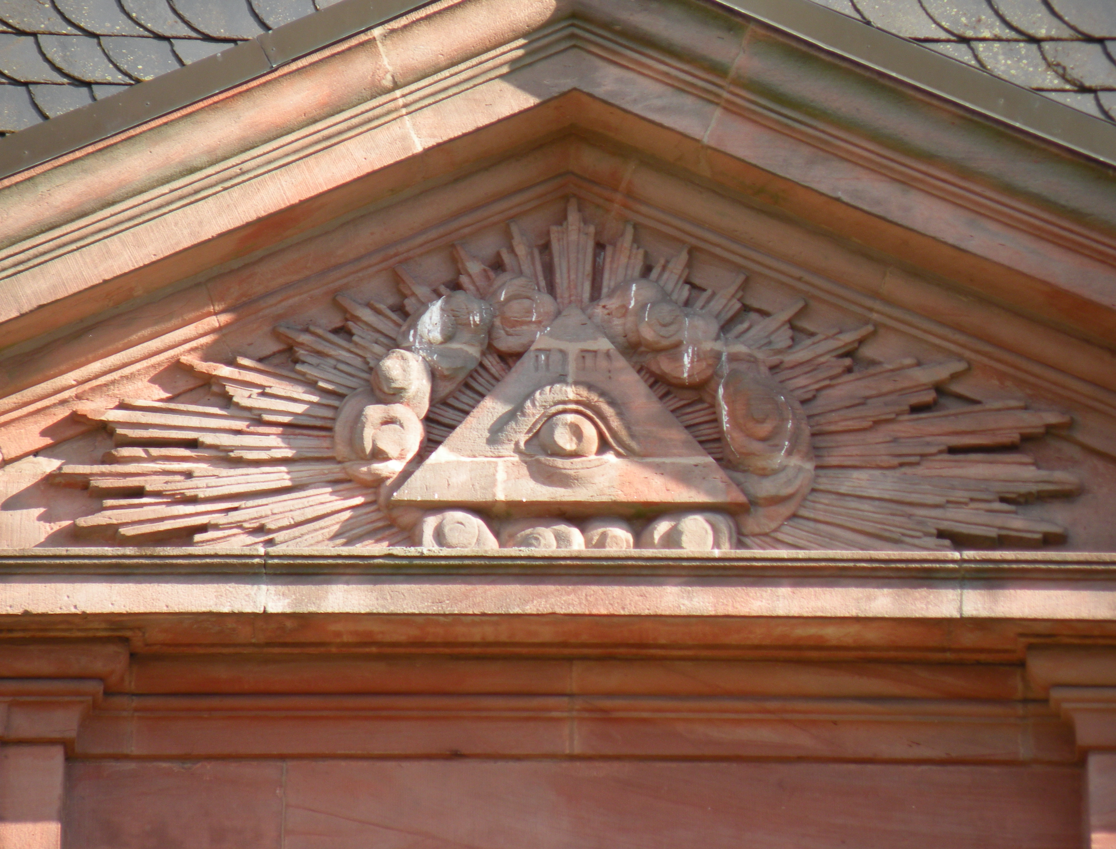 Trippstadter Schloss - Inschrift